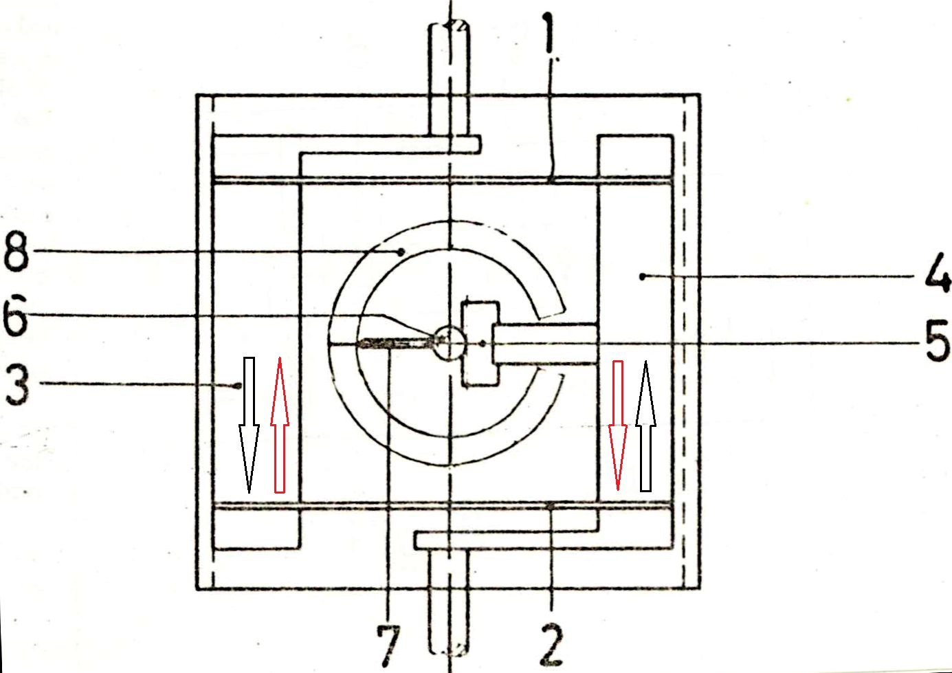 Kraftmesser mit Geradführung mit Hilfe von zwei Federgelenken: zwei Blattfedern (1 u. 2), eingespannt zwischen Festkörpern (3 u. 4)